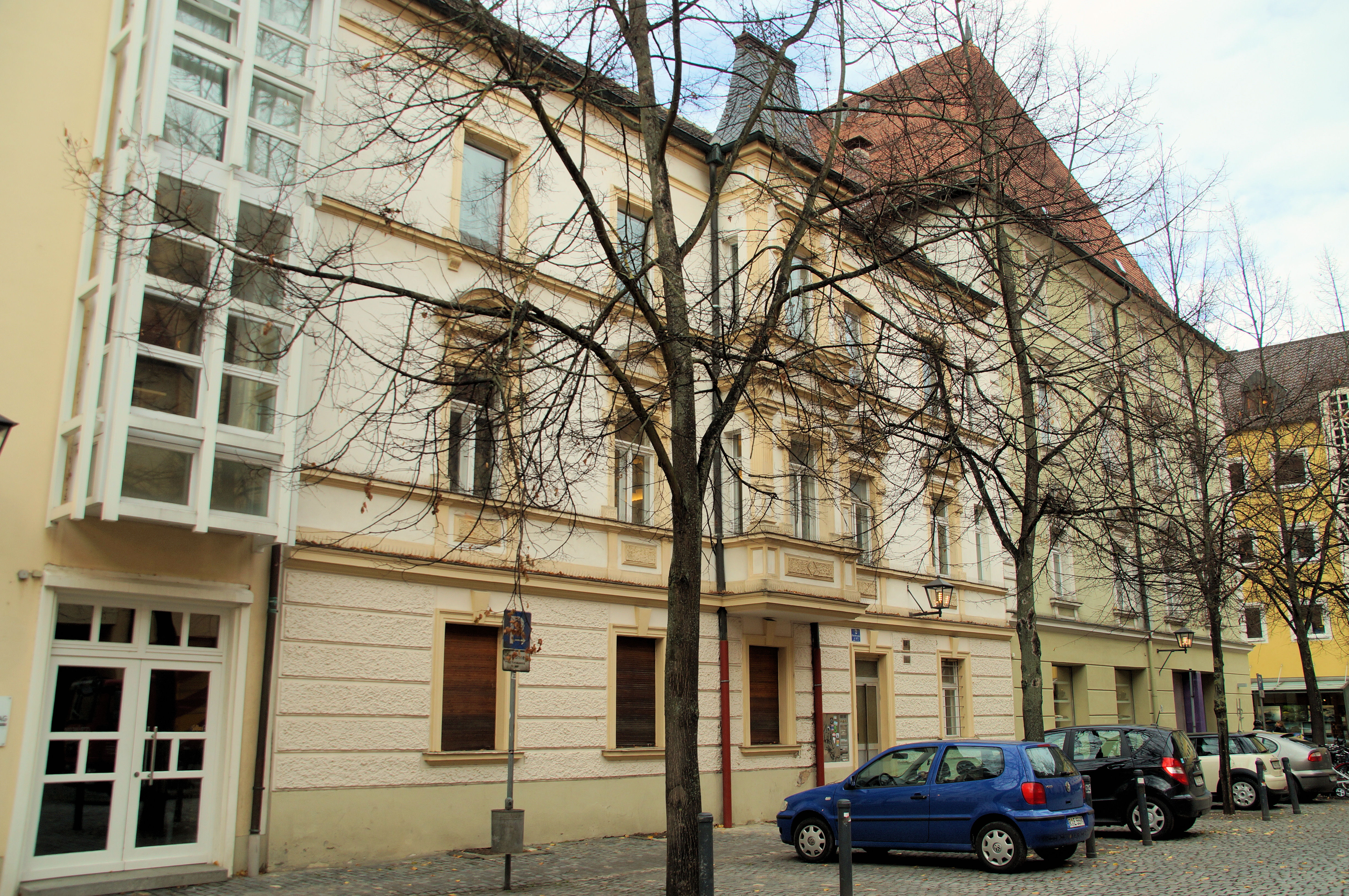 Dreigeschossiger und traufständiger Satteldachbau, Fassade mit Mittelerker und Werksteingliederungen, Neurenaissance, 1892 von Johann Wagner und Friedrich Pfündl. This is a photograph of an architectural monument.